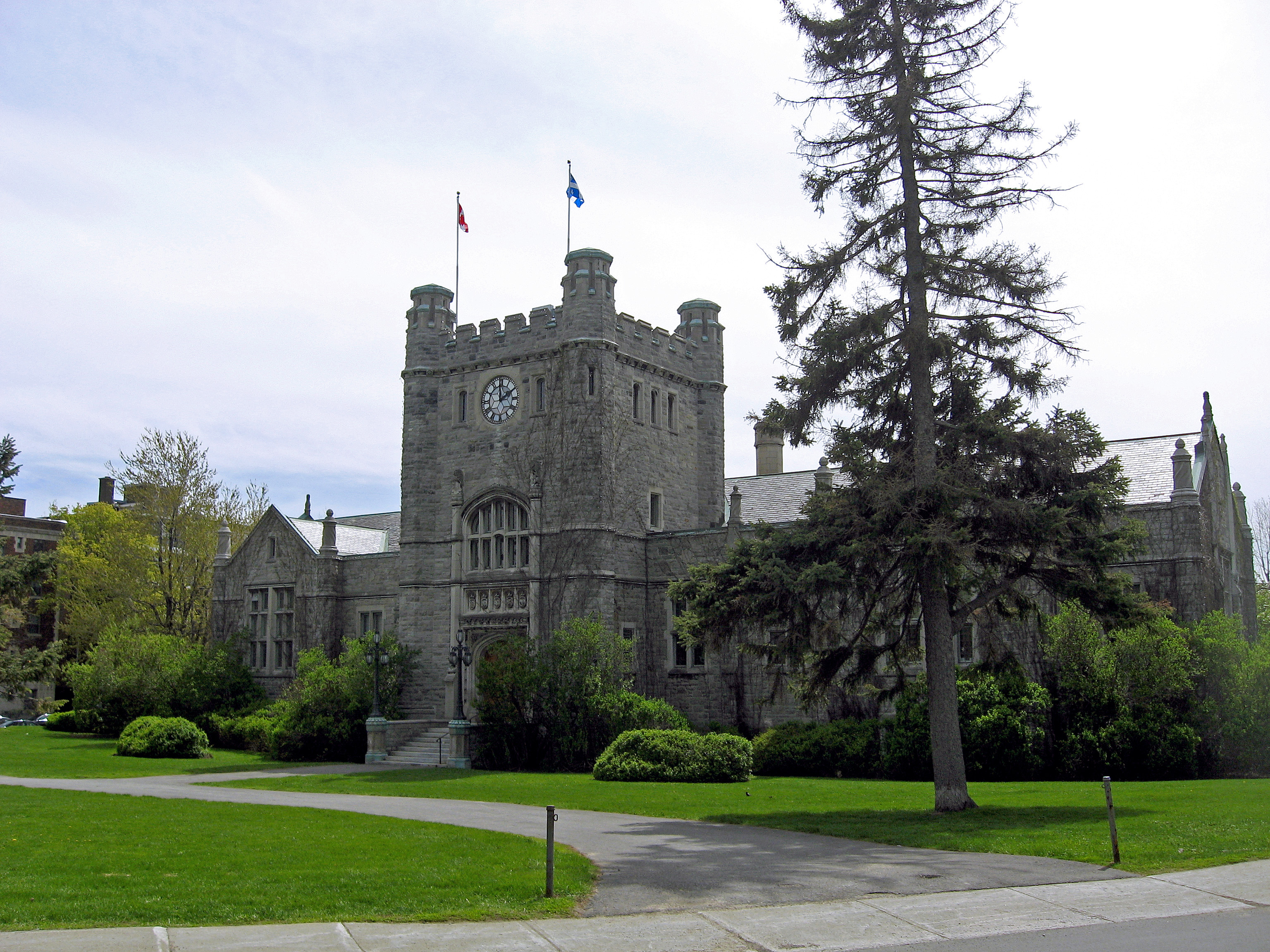 L'hôtel de ville de Westmount, Québec.